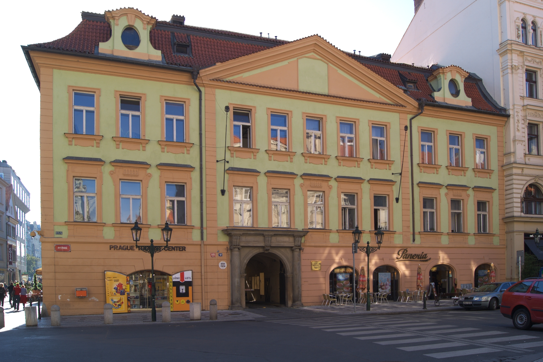 Palác městský, Stará Rychta, Havelská brána (Staré Město), Praha 1, Rytířská 404/12, Staré Město